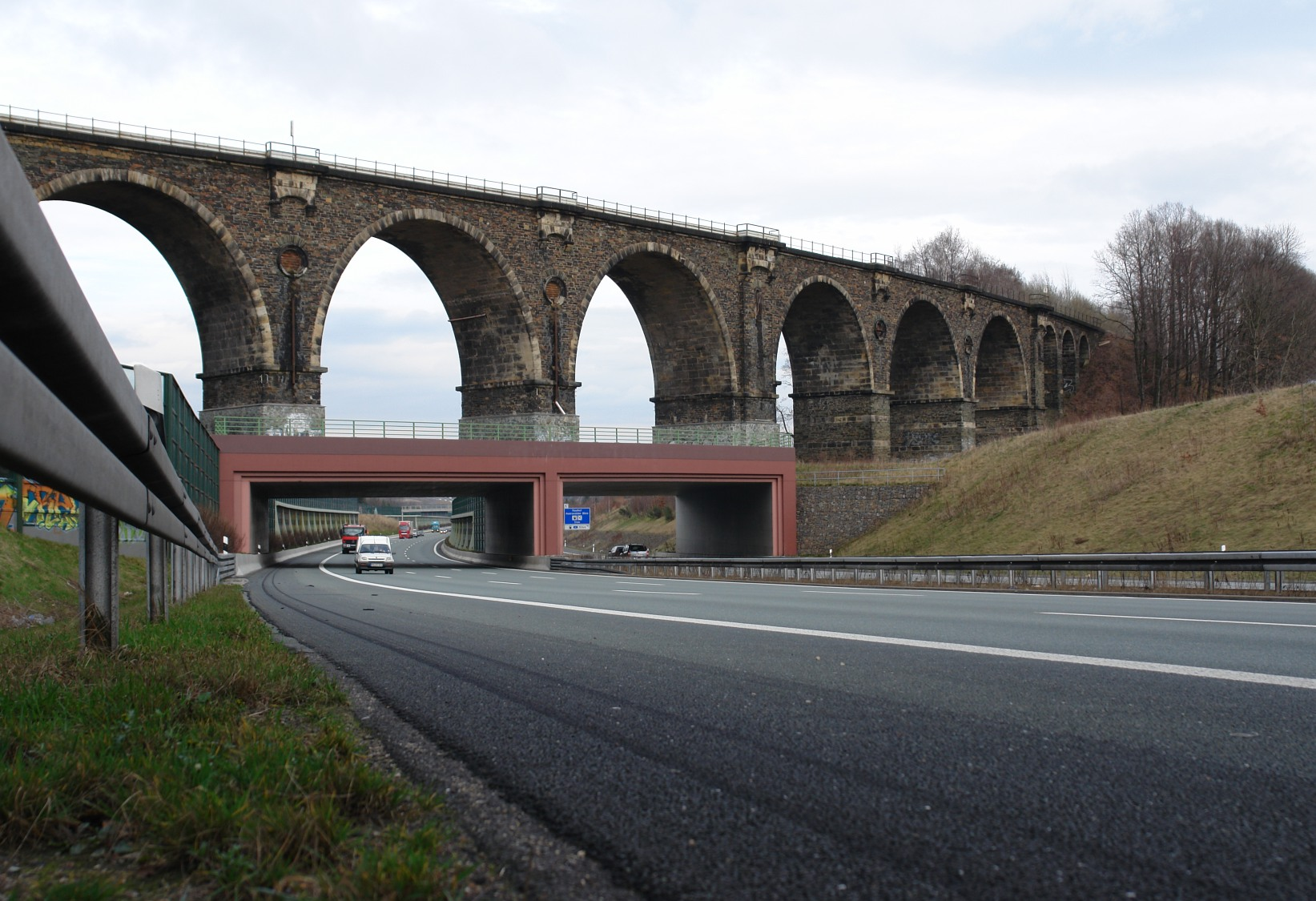 Autobahn A4 kreuzt Eisenbahnlinie Chemnitz–Leipzig am Bahrebachmühlenviadukt.